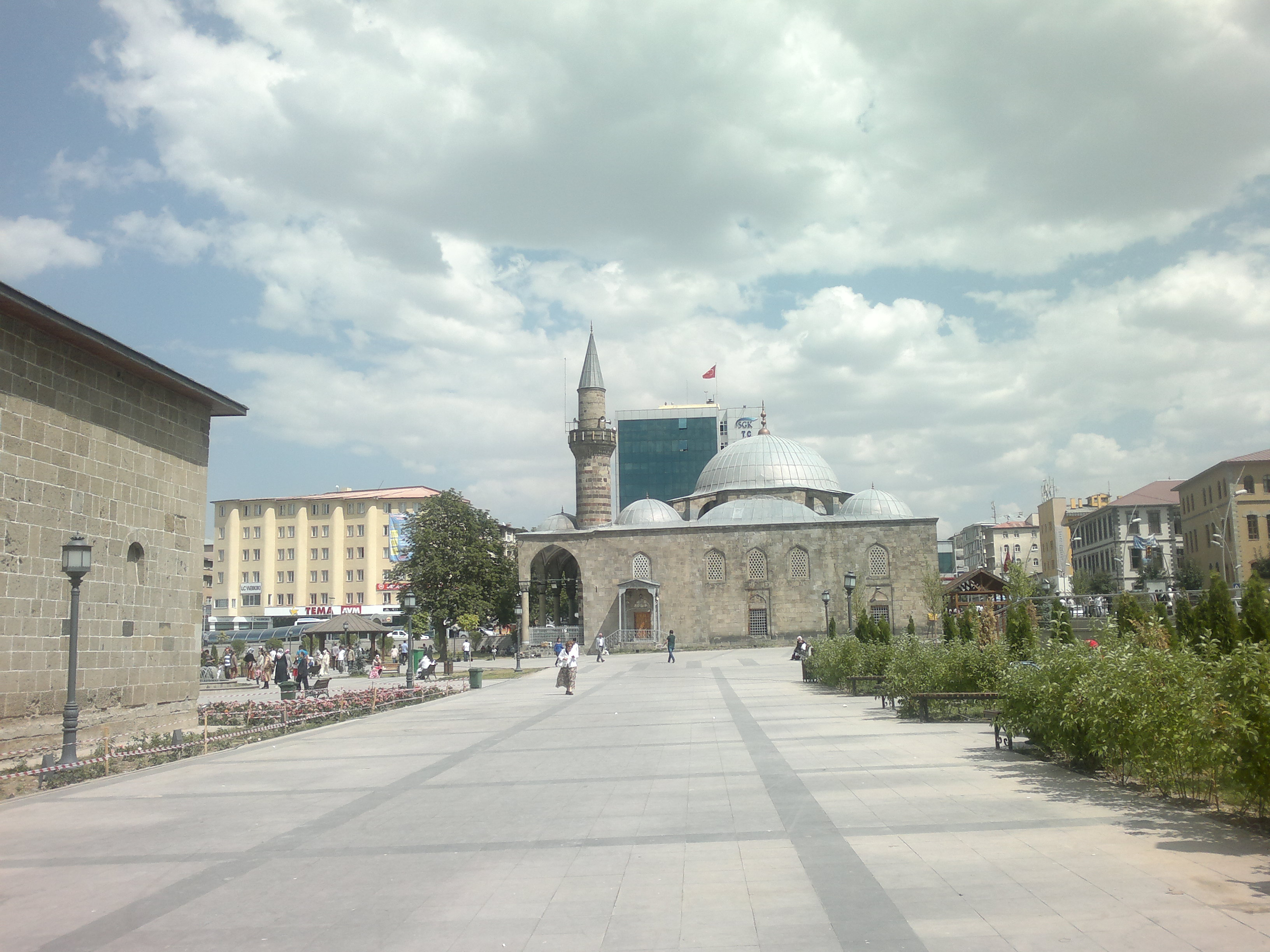 Erzurum Lala Mustafa Paşa Camii, Türkiye'de Erzurum İli merkez ilçesi Yakutiye'de 1562 yılında Lala Mustafa Paşa tarafından yaptırılmış Erzurum ’daki ilk Osmanlı camisidir.